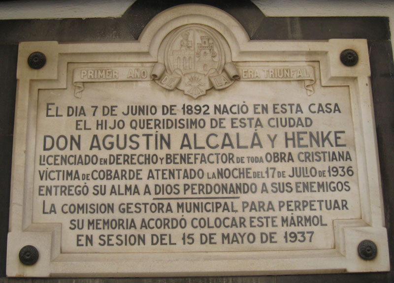 "PRIMER AÑO TRIUNFAL" "El día 7 de junio de 1892 nació en esta casa el hijo queridísimo de esta ciudad Don Agustín Alcalá y Henke Licenciado en derecho y benefactor de toda obra cristiana Víctima de cobarde atentado la noche del 17 de julio de 1936 Entregó su alma a dios perdonando a sus enemigos La comisión gestora municipal para perpetuar su memoria acordó colocar este mármol en sesión del 15 de mayo de 1937"